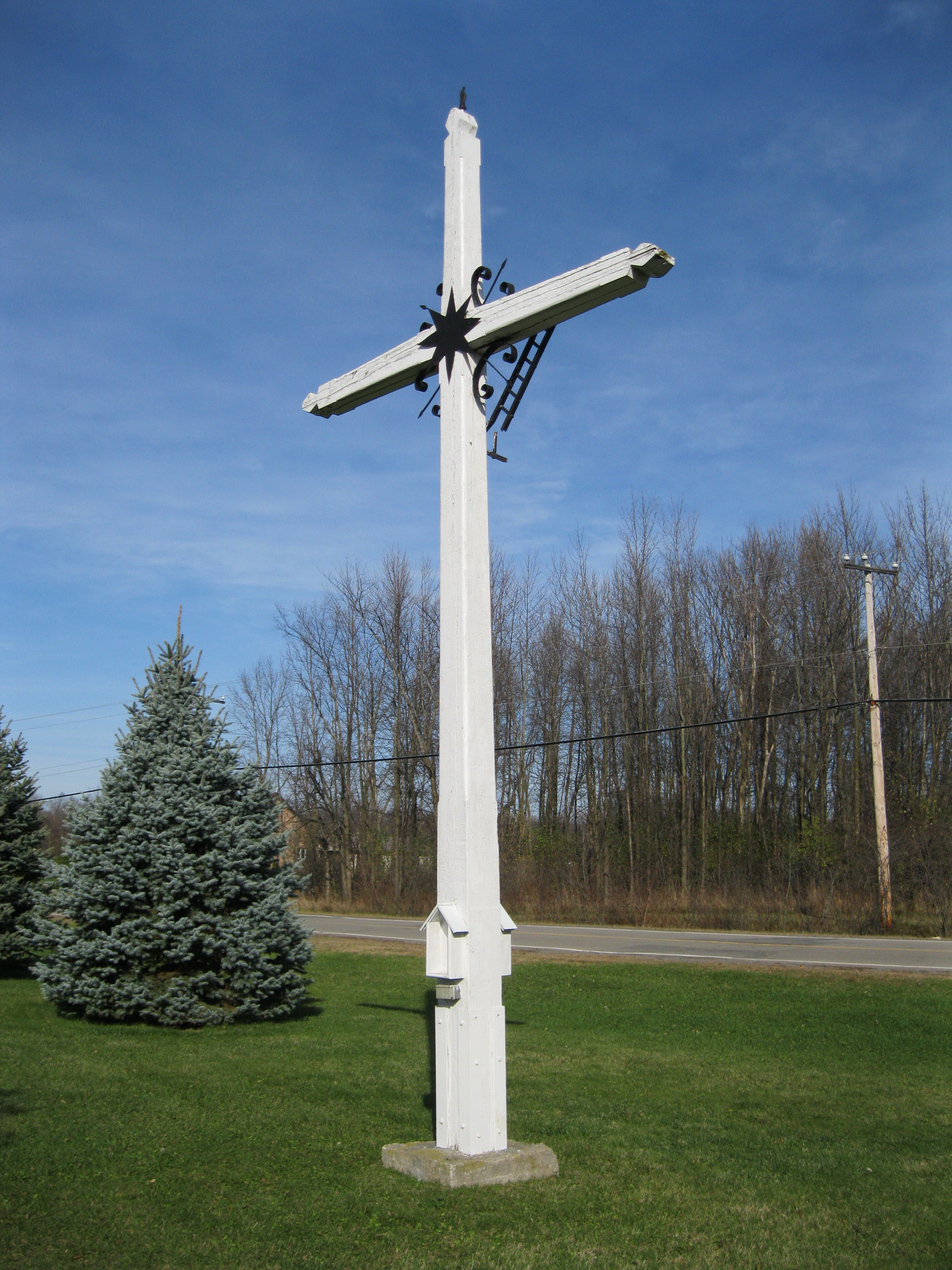 Croix de chemin de la montée Wilson 1158, montée Wilson, Montréal, Québec